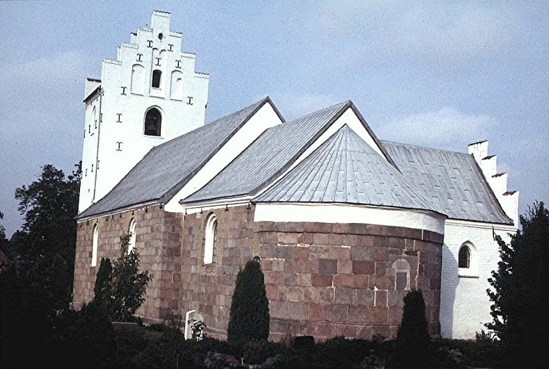 Sønderholm Kirke i Danmark. Sønderholm kirke